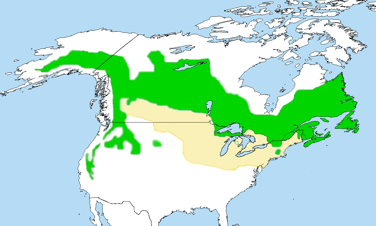 Picoides arcticus Verbreitungskarte